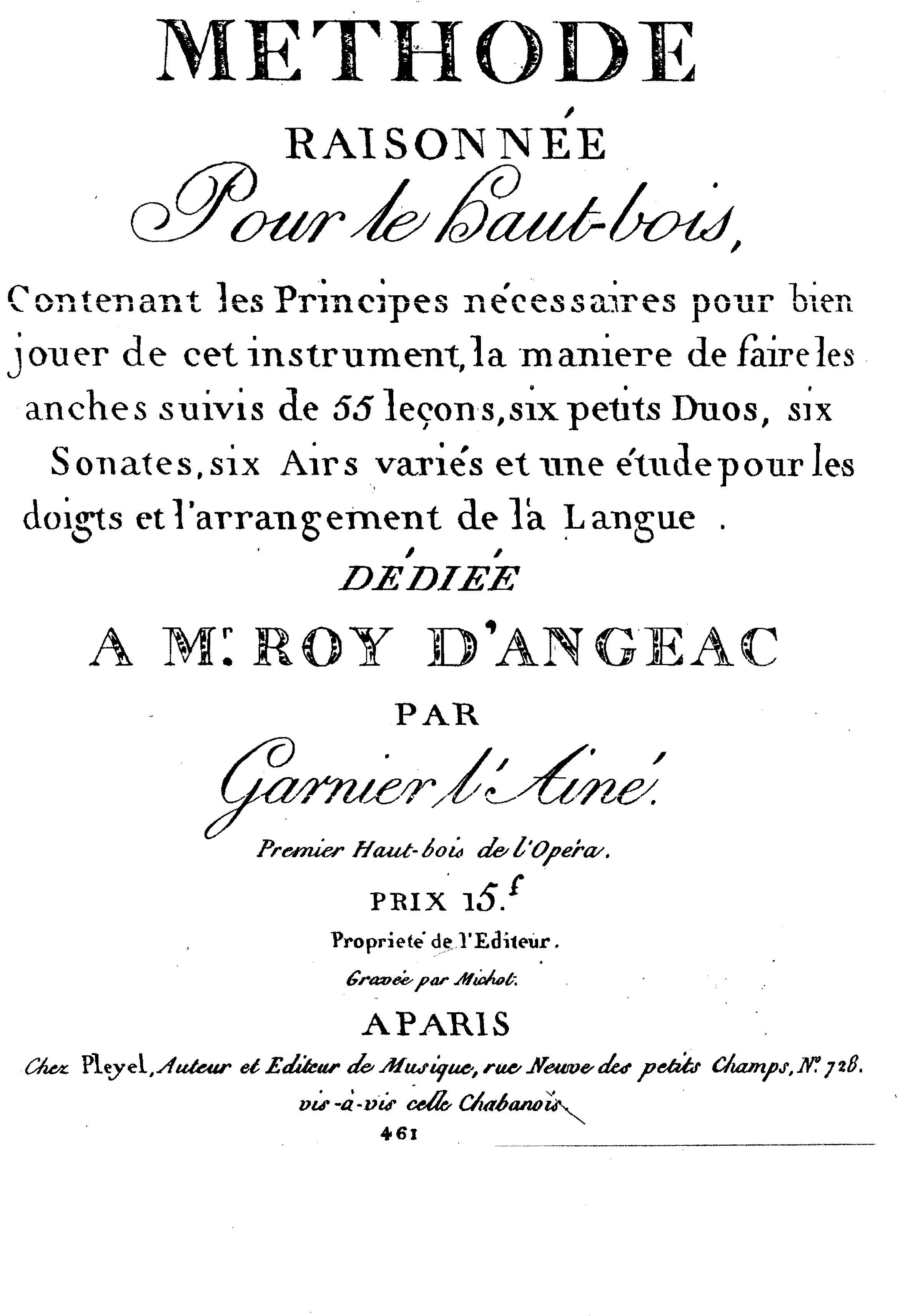 Méthode raisonnée pour le haut-bois par Garnier l'Ainé, 1798